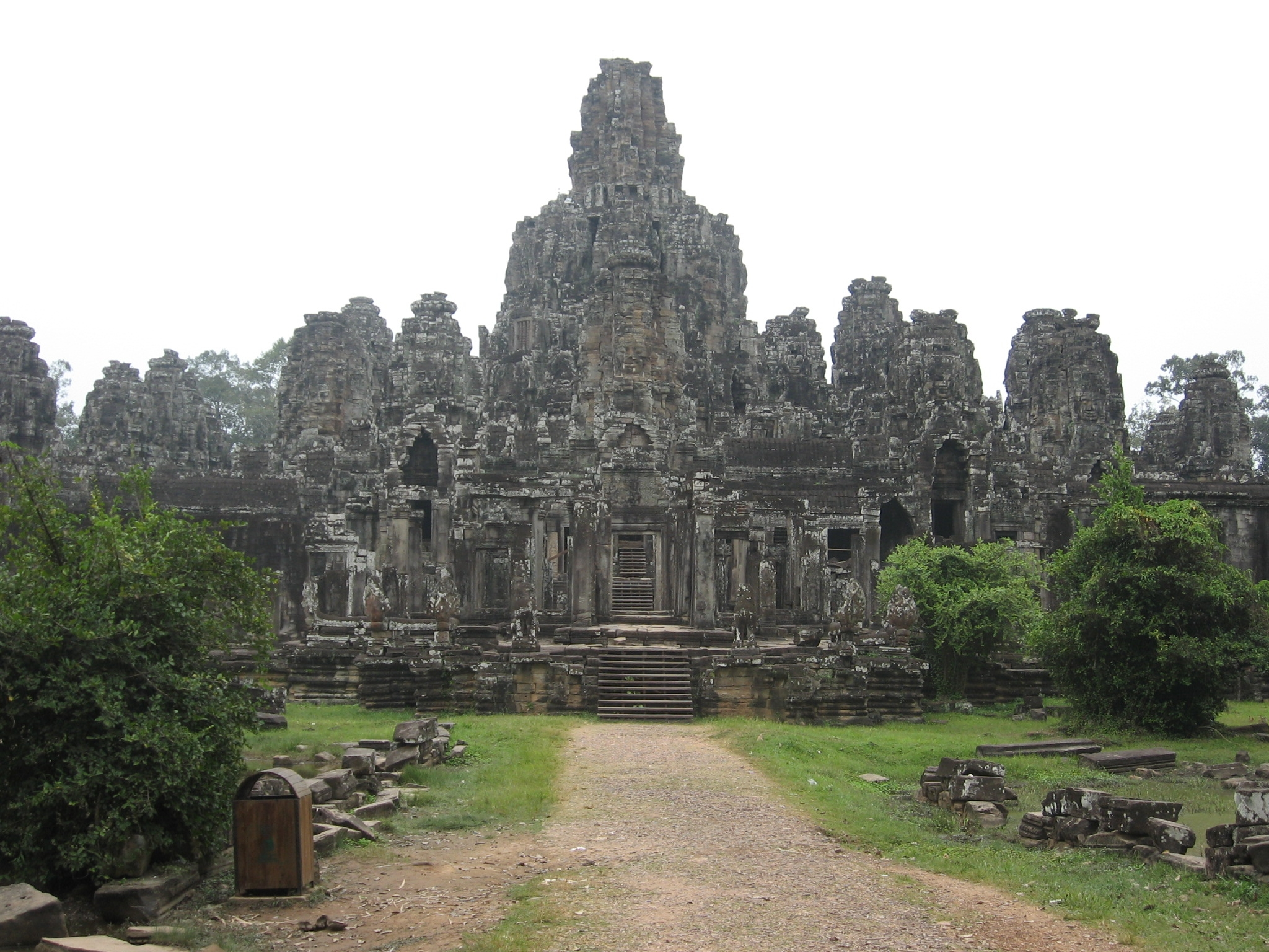 Bayon Temple, Angkor